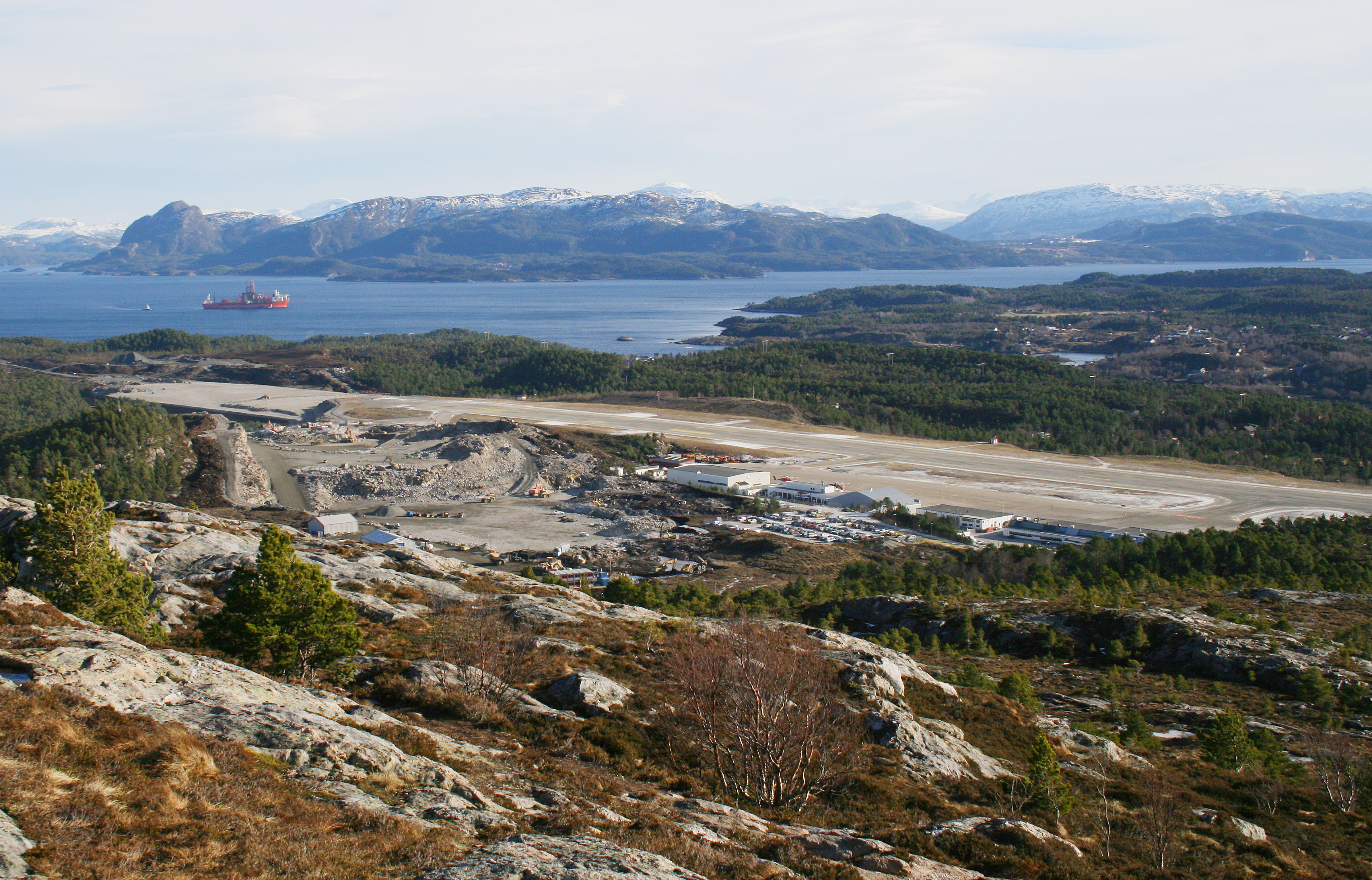 Oversiktsbilde av østre del av flyplassområdet på Kvernberget